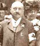 H. Koppeschaar